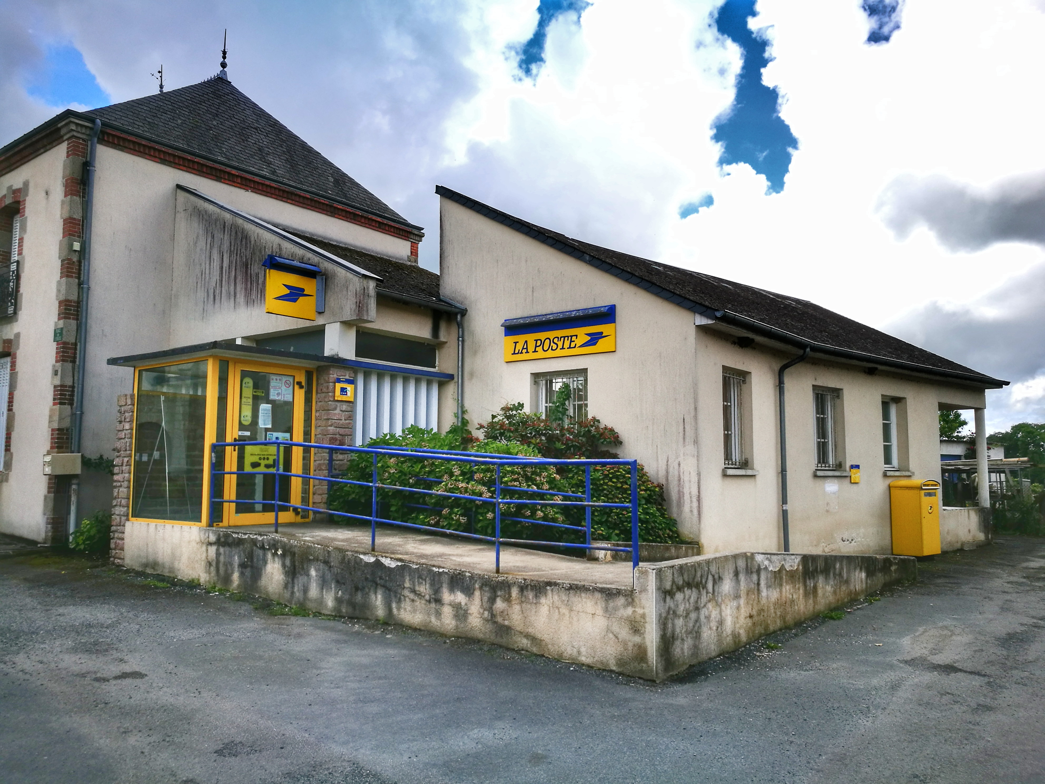 Vue du bâtiment de la Poste de la commune de Lourdoueix-Saint-Pierre, Creuse, France, depuis la place du village.